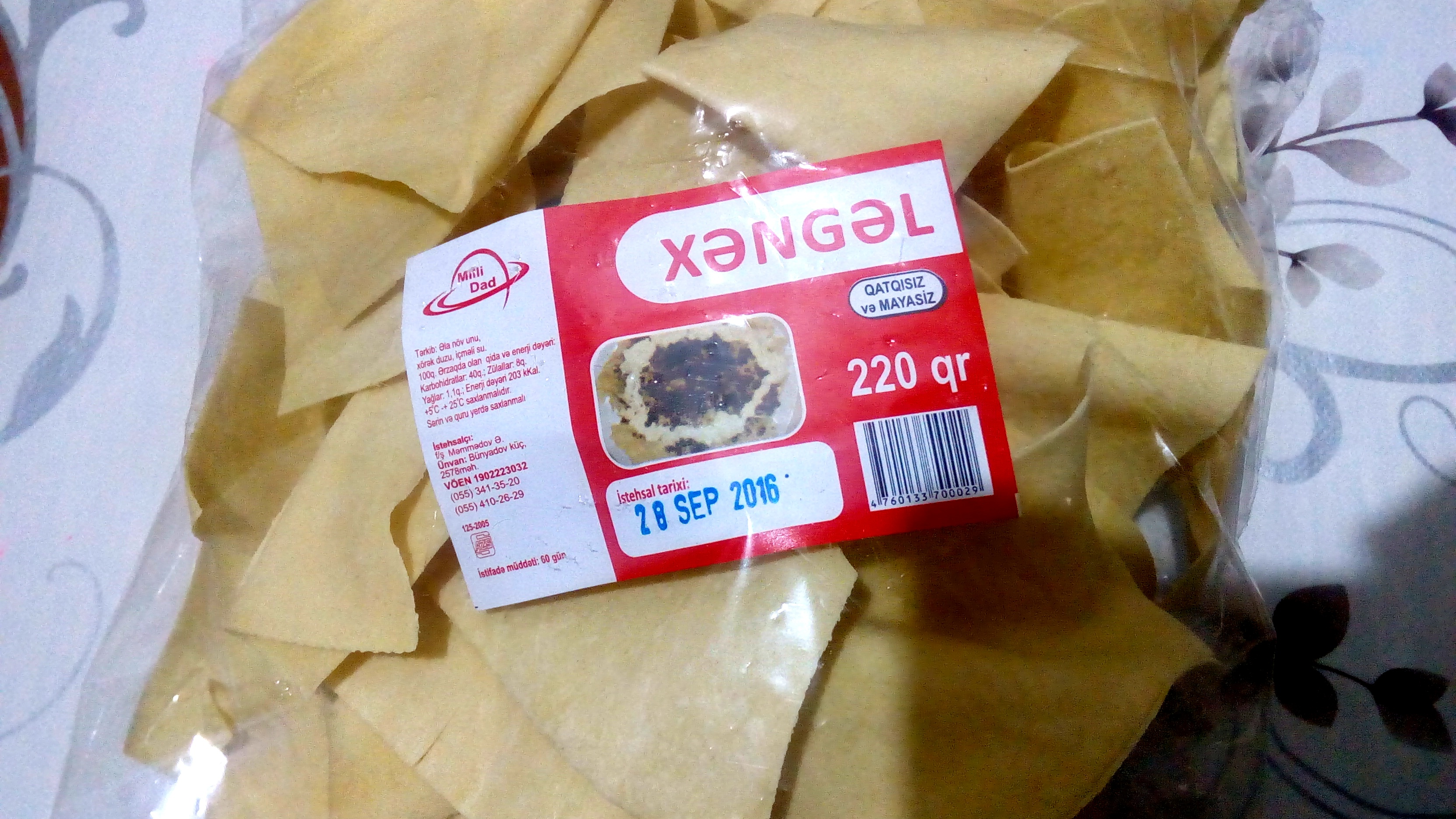 Xəngəl